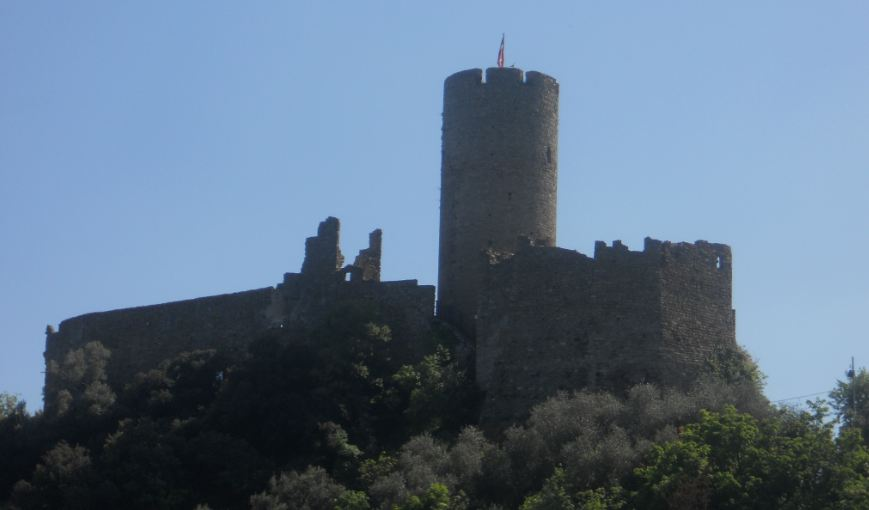 Castello di Monte Ursino.